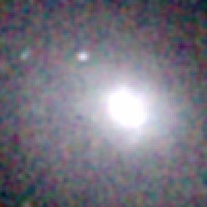 Galaxy NGC 3077